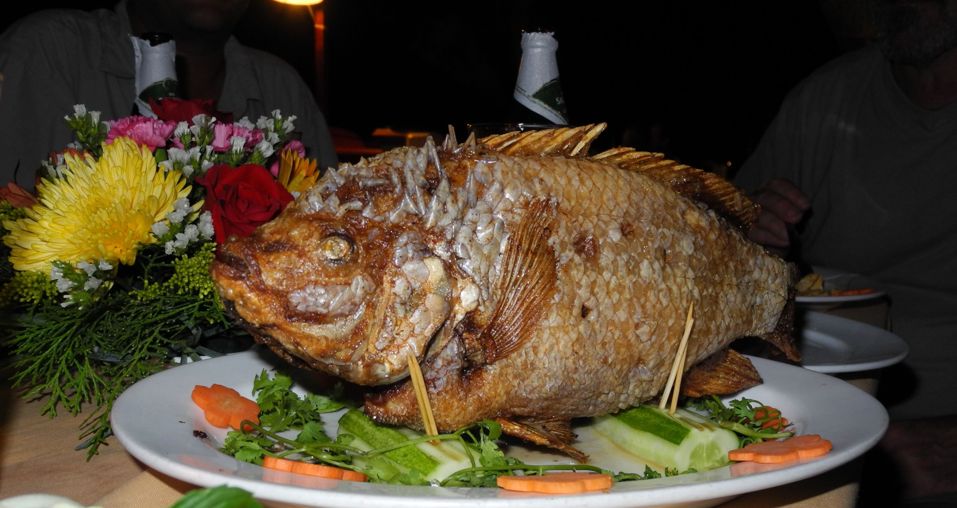 Can Tho City-Elefantenohrfisch vom Grill